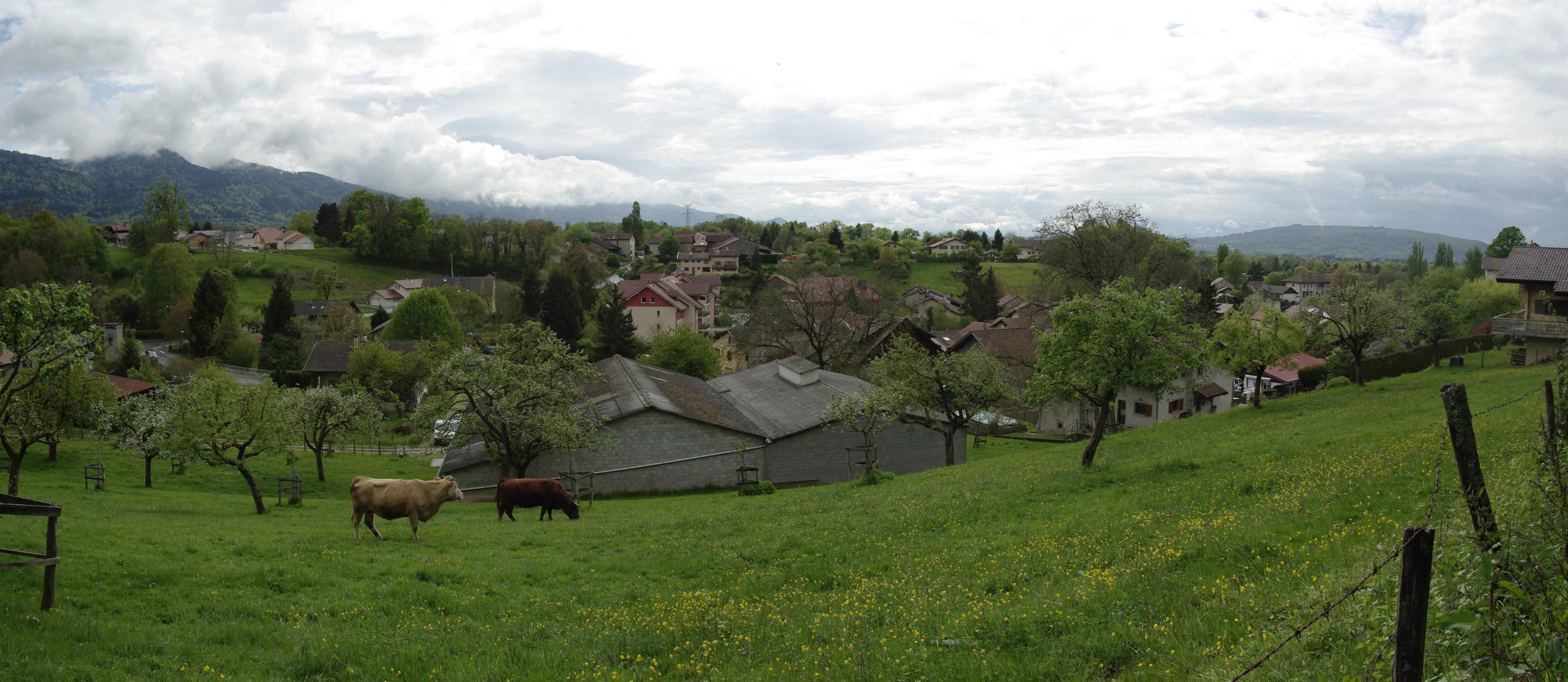 Vue sur Perrignier centre